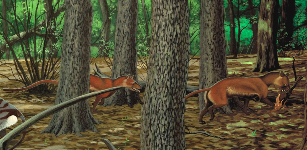 Cormocyon copei, a borophagine dog